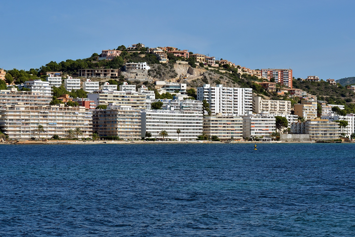 Santa Ponça, Mallorca, Balearen, Spanien, Datum/Uhrzeit: 01.11.2013 12:35:17